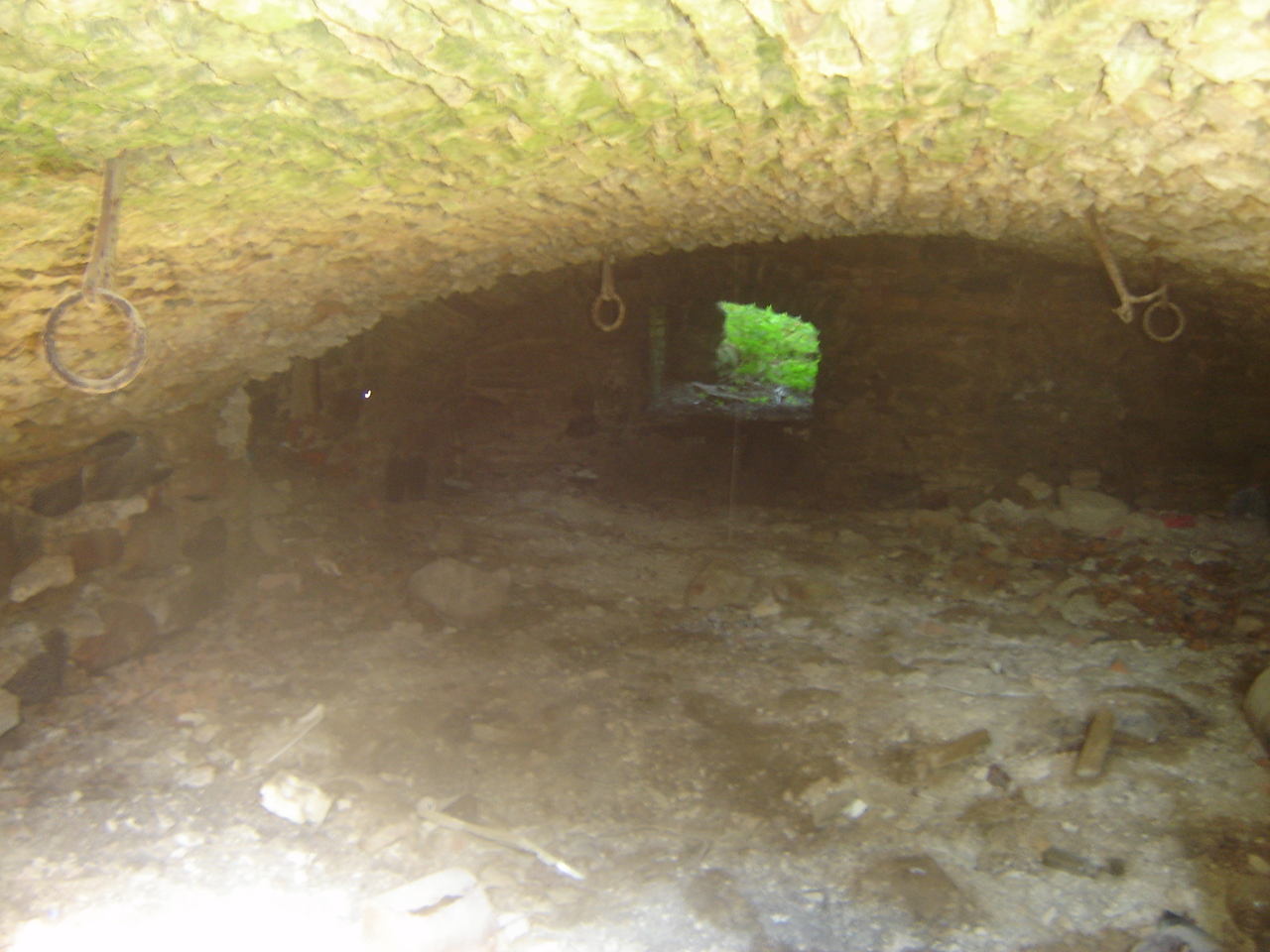 Linnuse lõunatiiva alumise korruse silindervõlv lagi